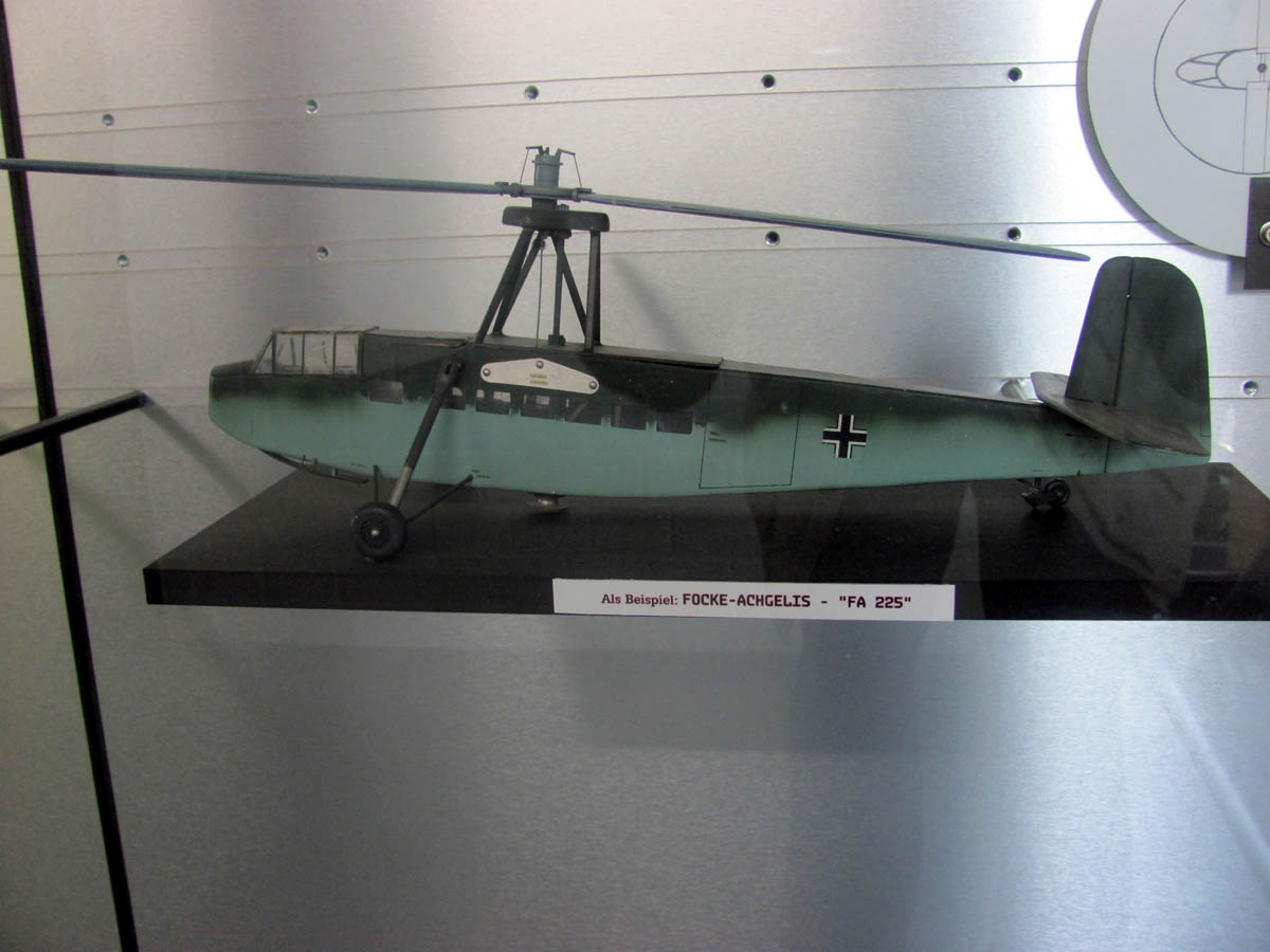 Modell des antriebslosen Experimental-Tragschraubers Focke-Achgelis Fa 225 im Hubschraubermuseum Bückeburg